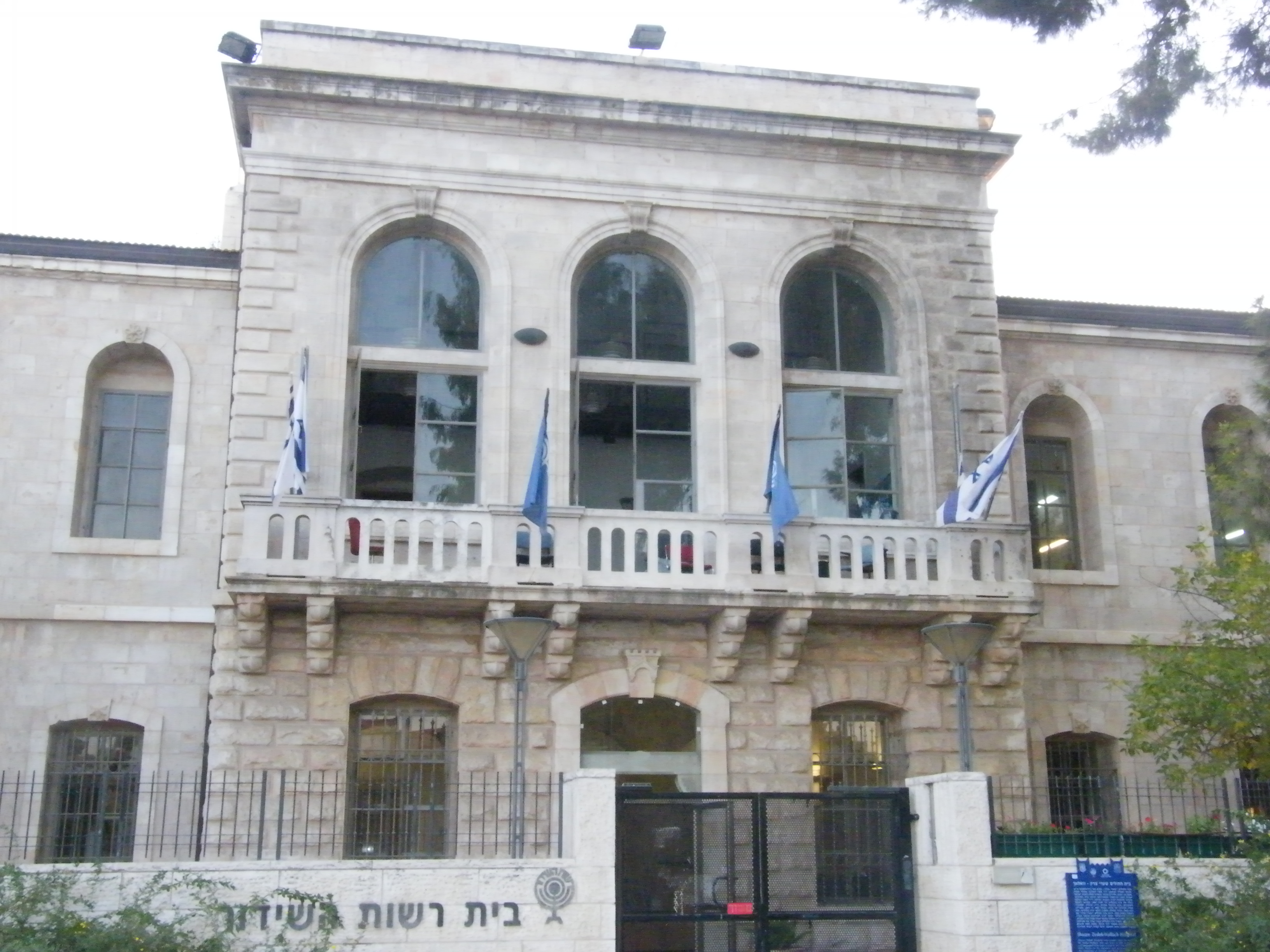 מבנה שערי צדק הישן הוא בניין השוכן על רחוב יפו 161 בירושלים, בו פעל בשנים 1902 - 1980 בית החולים שערי צדק. כיום משמש המבנה להנהלת רשות השידור. בחצר המבנה ישנו בית קברות קטן מתקופת קום המדינה.